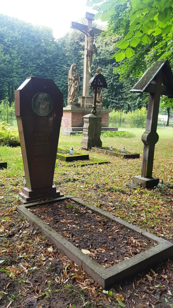 Kunibert Krix Cmentarz kanoników we Fromborku